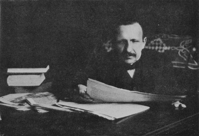 Hornjoserbsce: Fotografija Marka Smolerja – serbski nakładnik a redaktor.